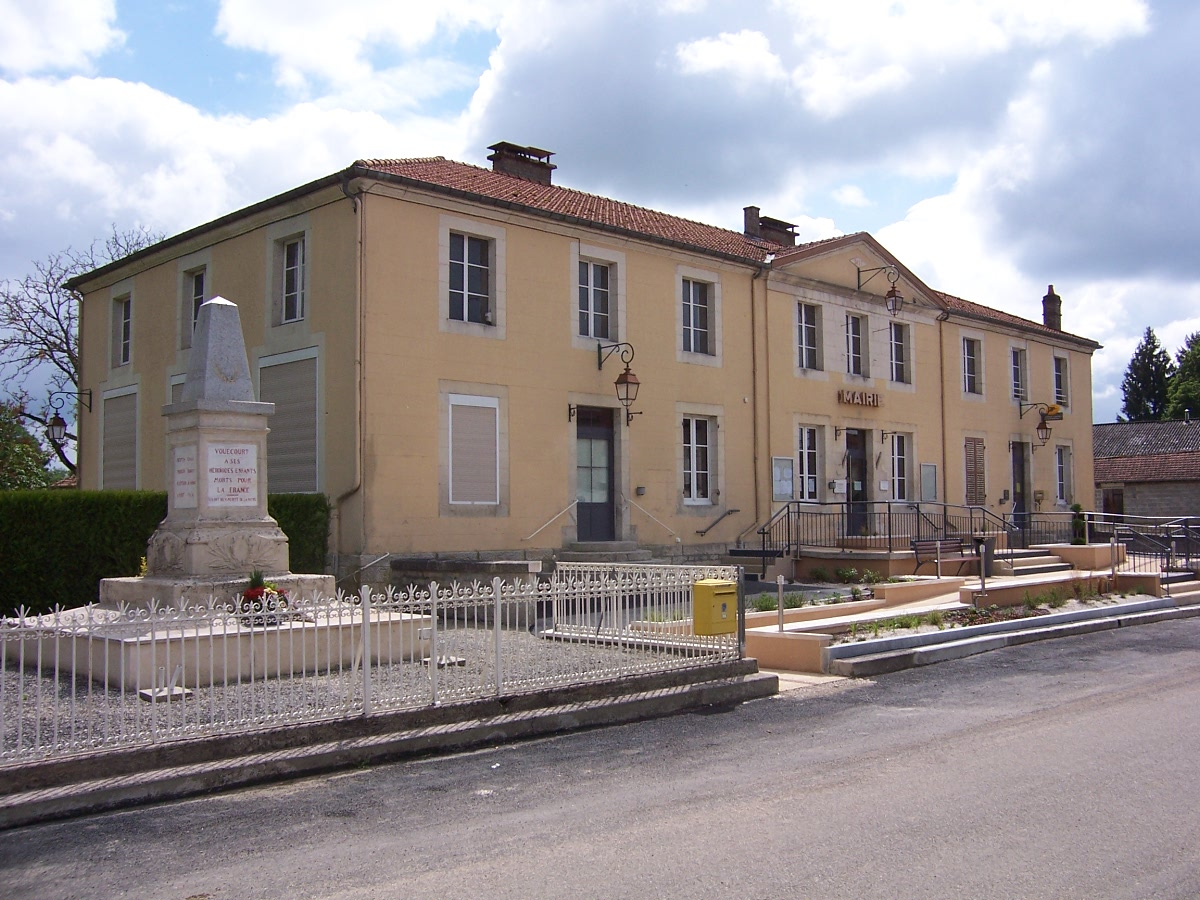 La mairie après les travaux de 2016